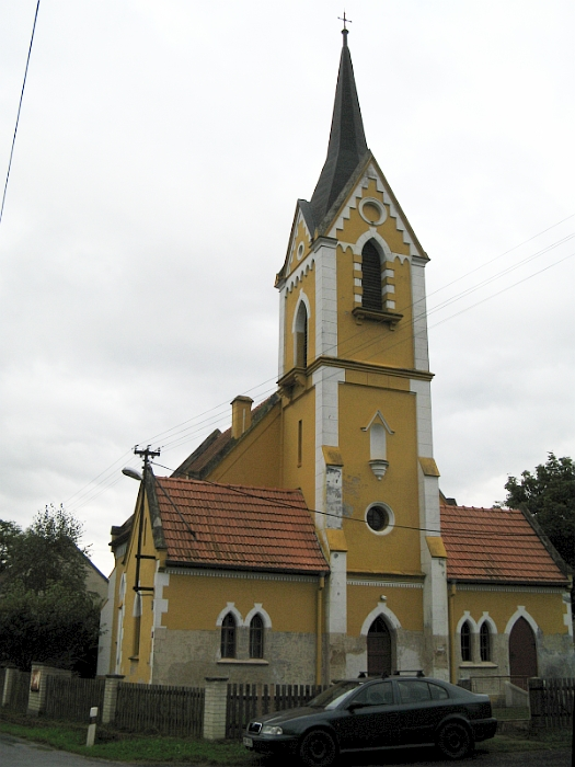 Kostel Českobratrské církve evangelické, Oráčov 82, Oráčov.